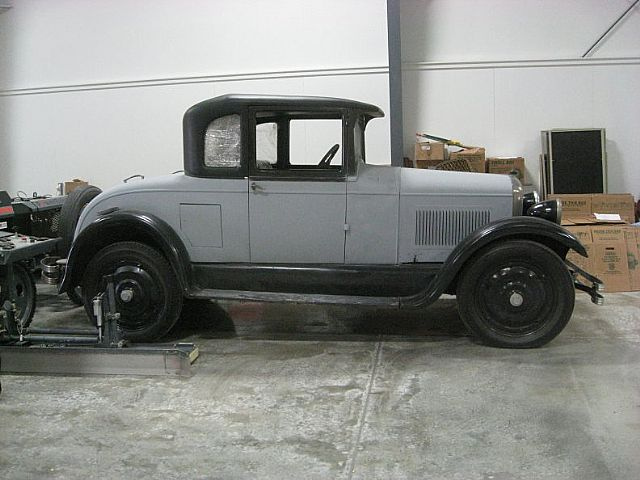 1927 Studebaker Dictator